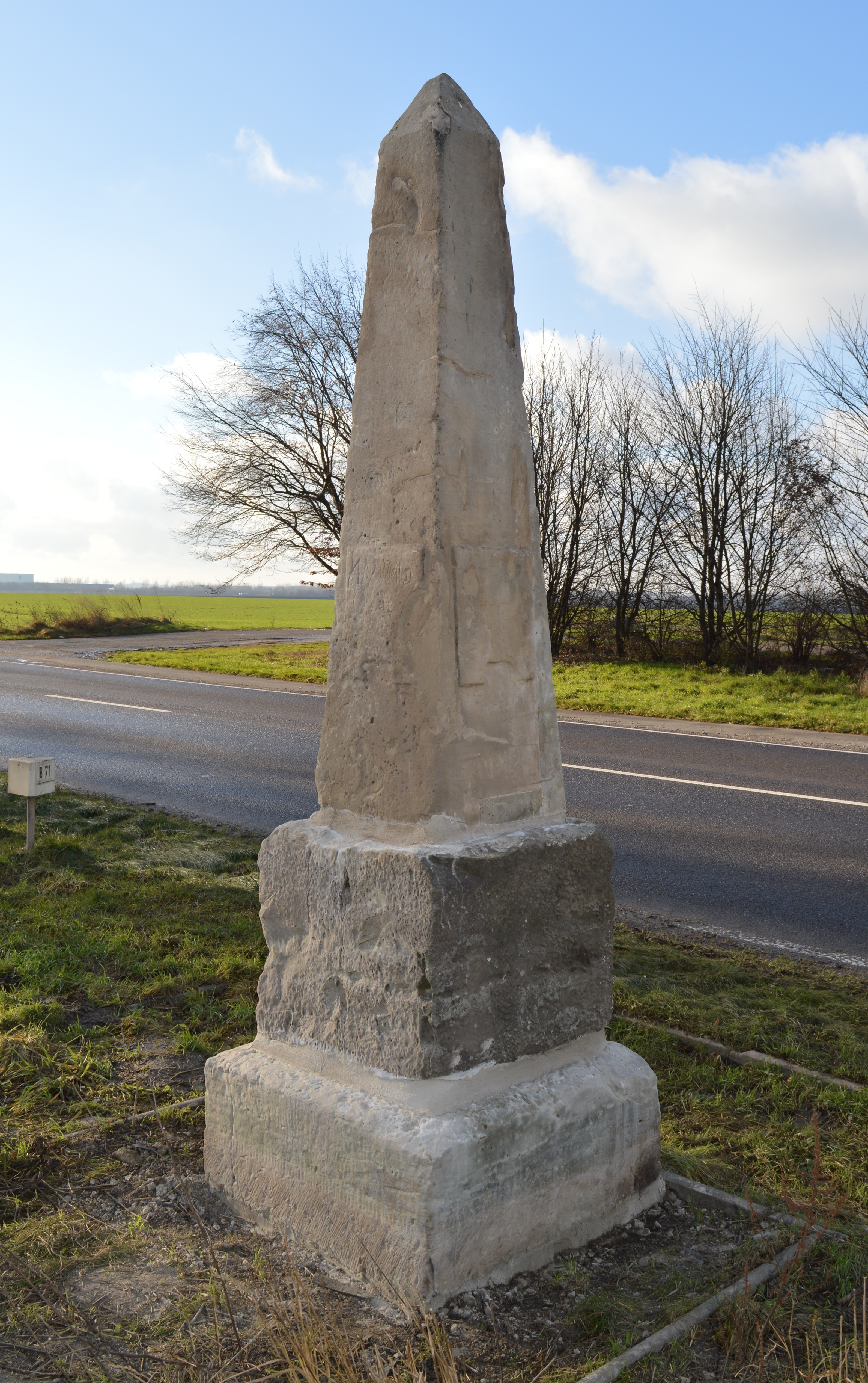 Meilensäule Beyendorfer Grund